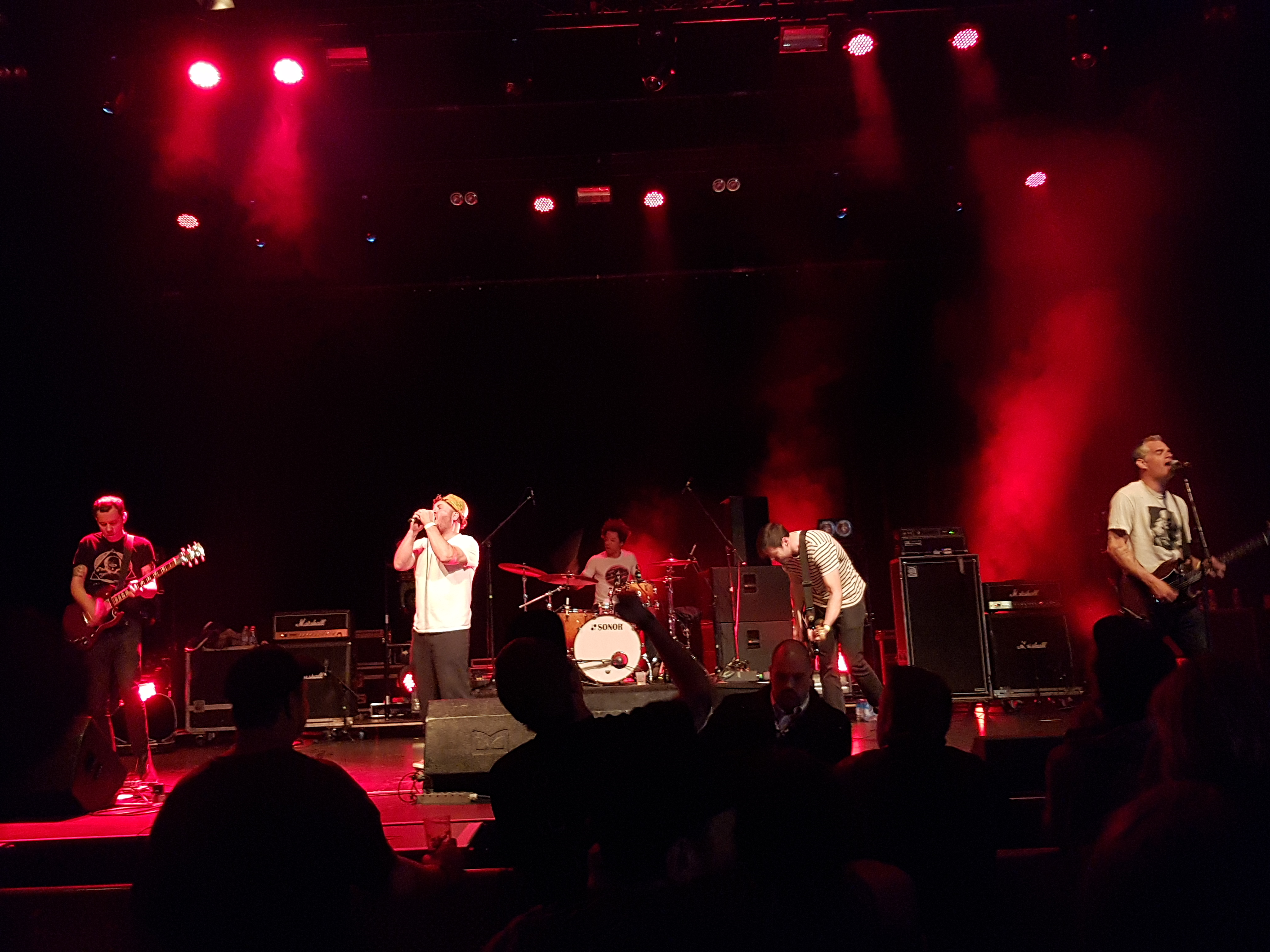 Samiam live auf dem Ant Attack Festival 2019